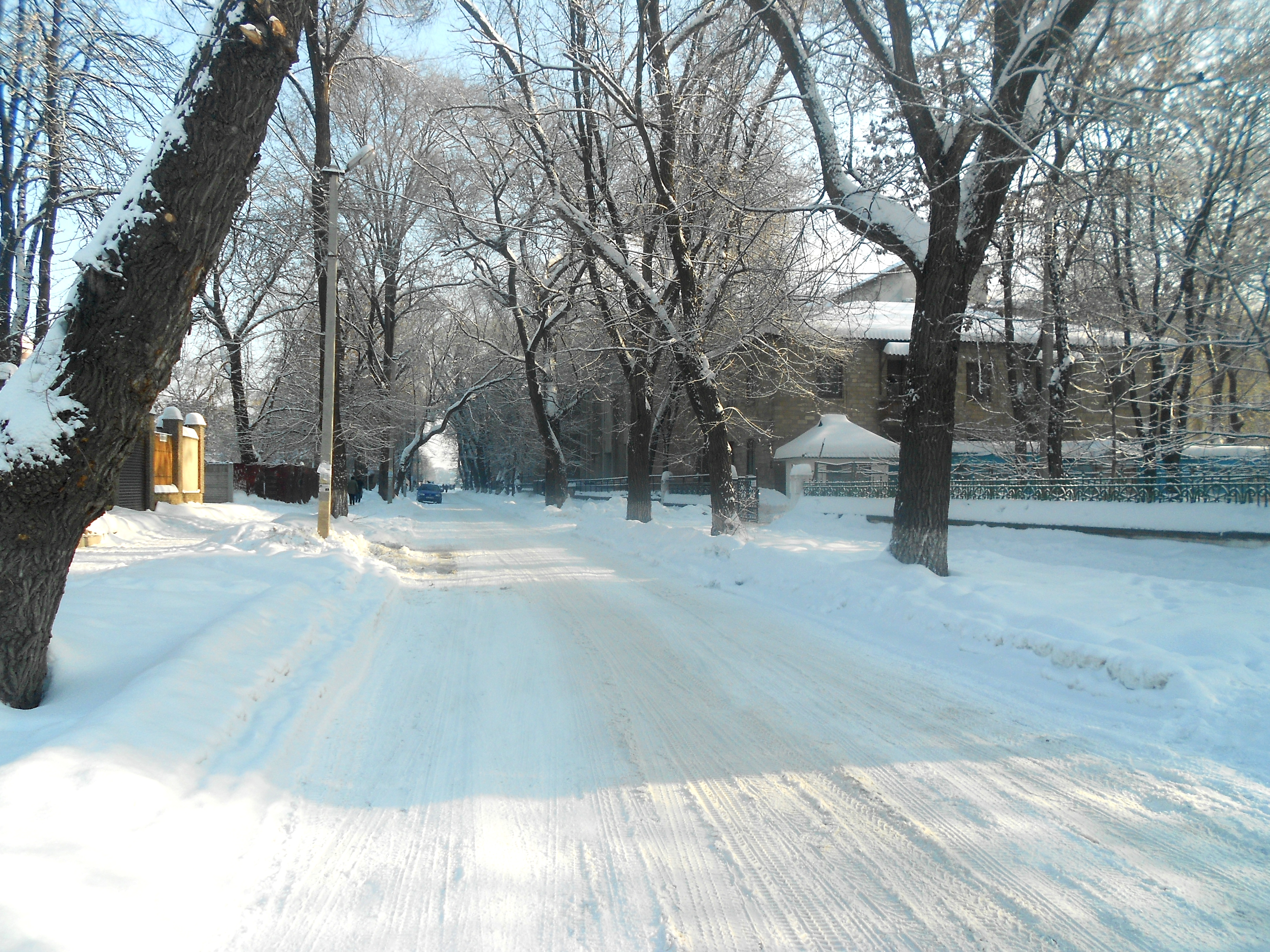 Strada Independenței, între străzile Pușkin și 31 August, din Bălți